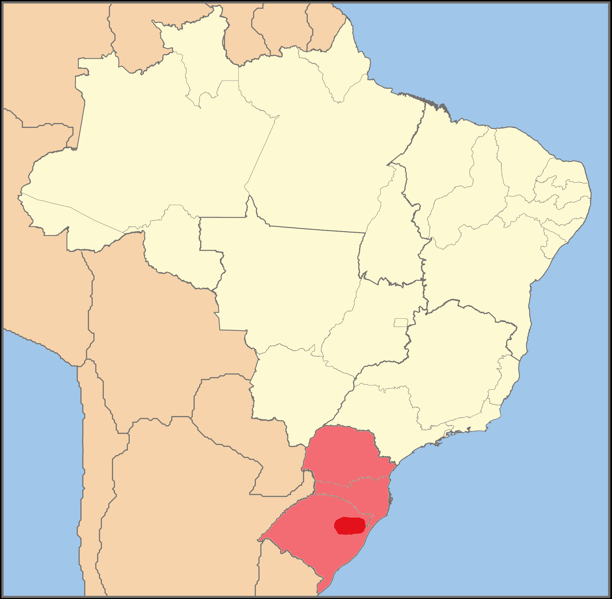 Extensión del Riograndenser Hunsrückisch. Estados de Brasil donde se habla (color rosa). En rojo fuerte la extensión según Ethnologue